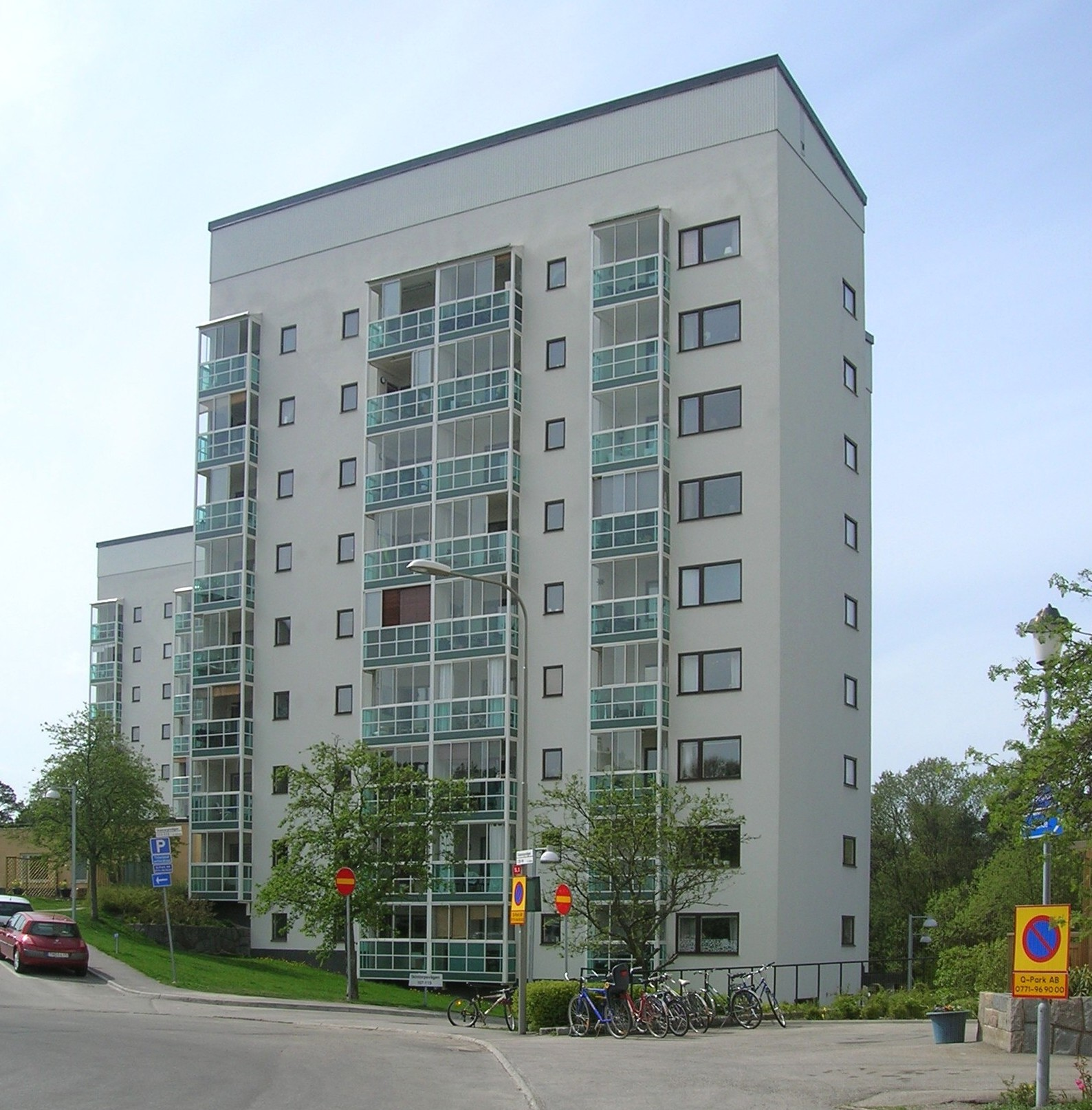 Sköntorpsvägen 115 i Årsta, uppförd 1962